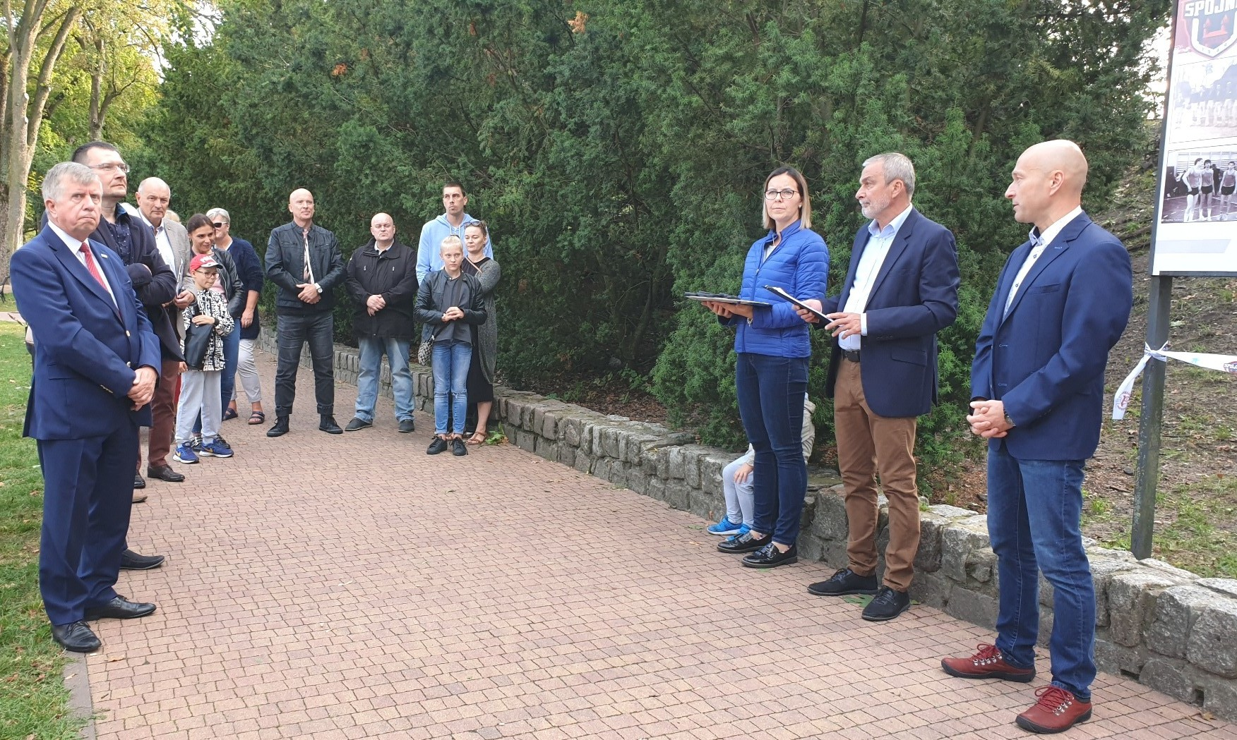 Jubileusz 70-lecia. Wystawa fotograficzna